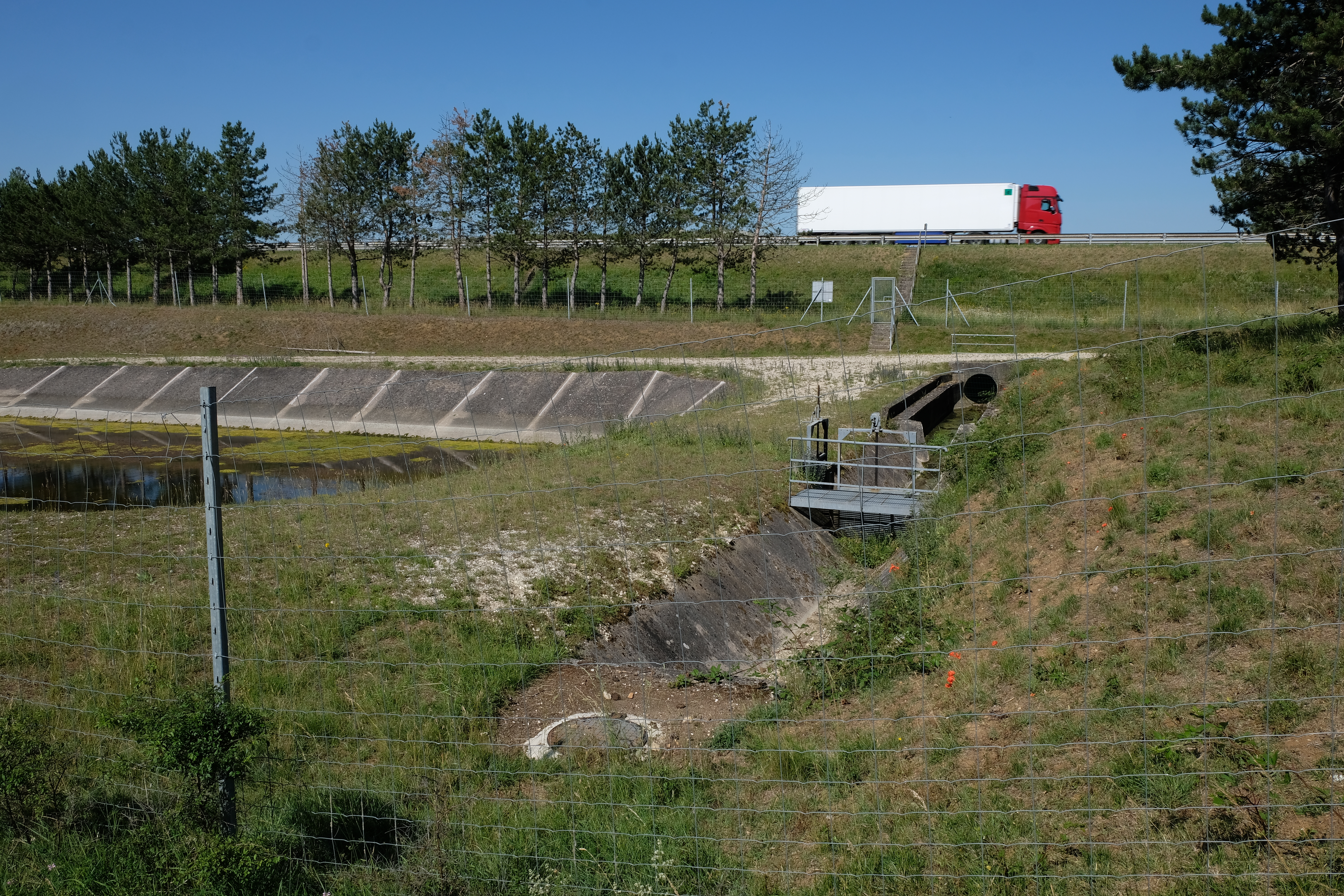 Système de drainage et bassin de rétention des eaux pluviales le long de l'autoroute A31 au kilomètre 219.800, près de Crézilles (Meurthe-et-Moselle).